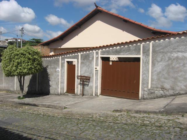 Vista da rua Paládio, bairro Coqueiros, em Belo Horizonte, Minas Gerais, Brasil